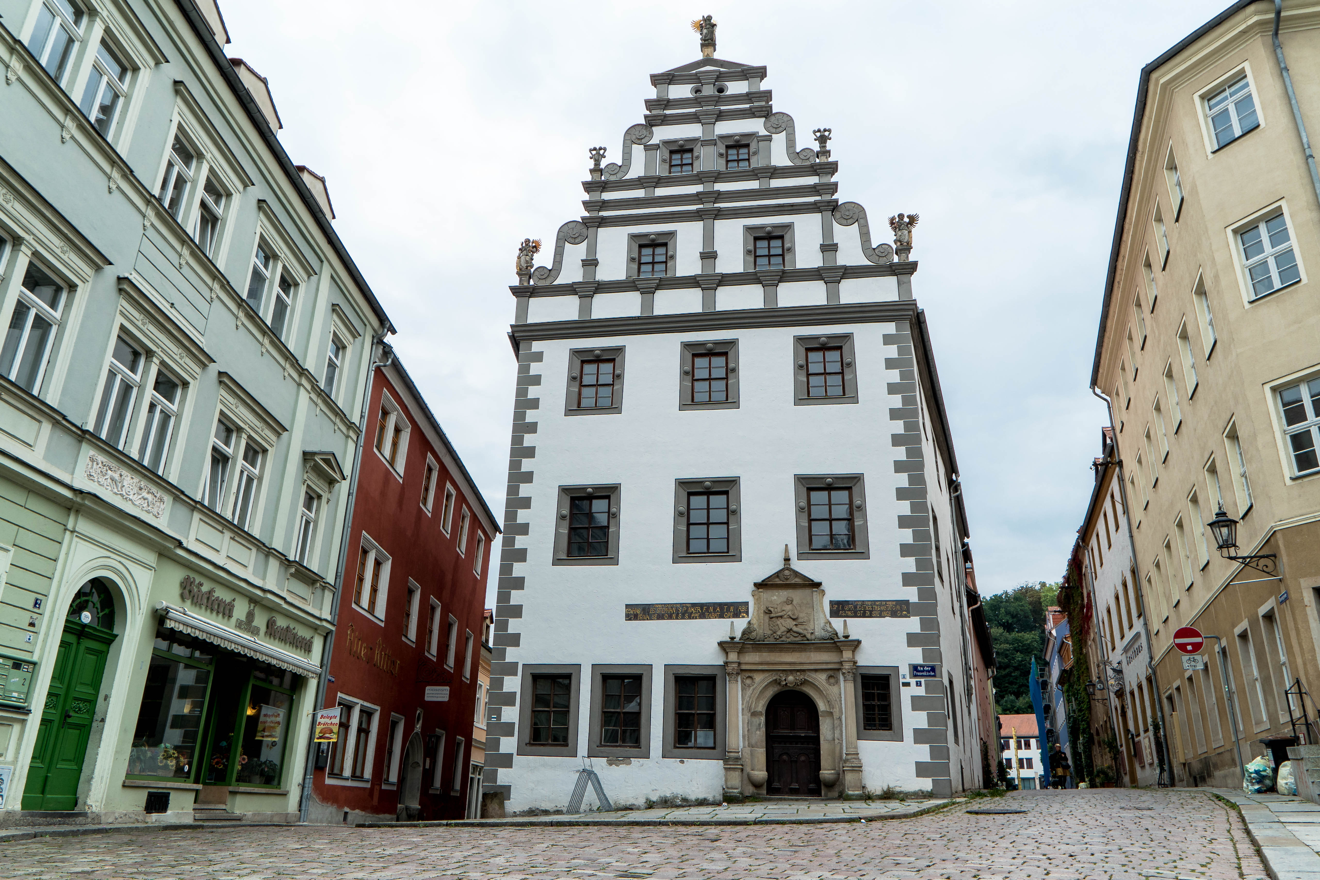 Altes Brauhaus, An der Frauenkirche 3 in Meißen